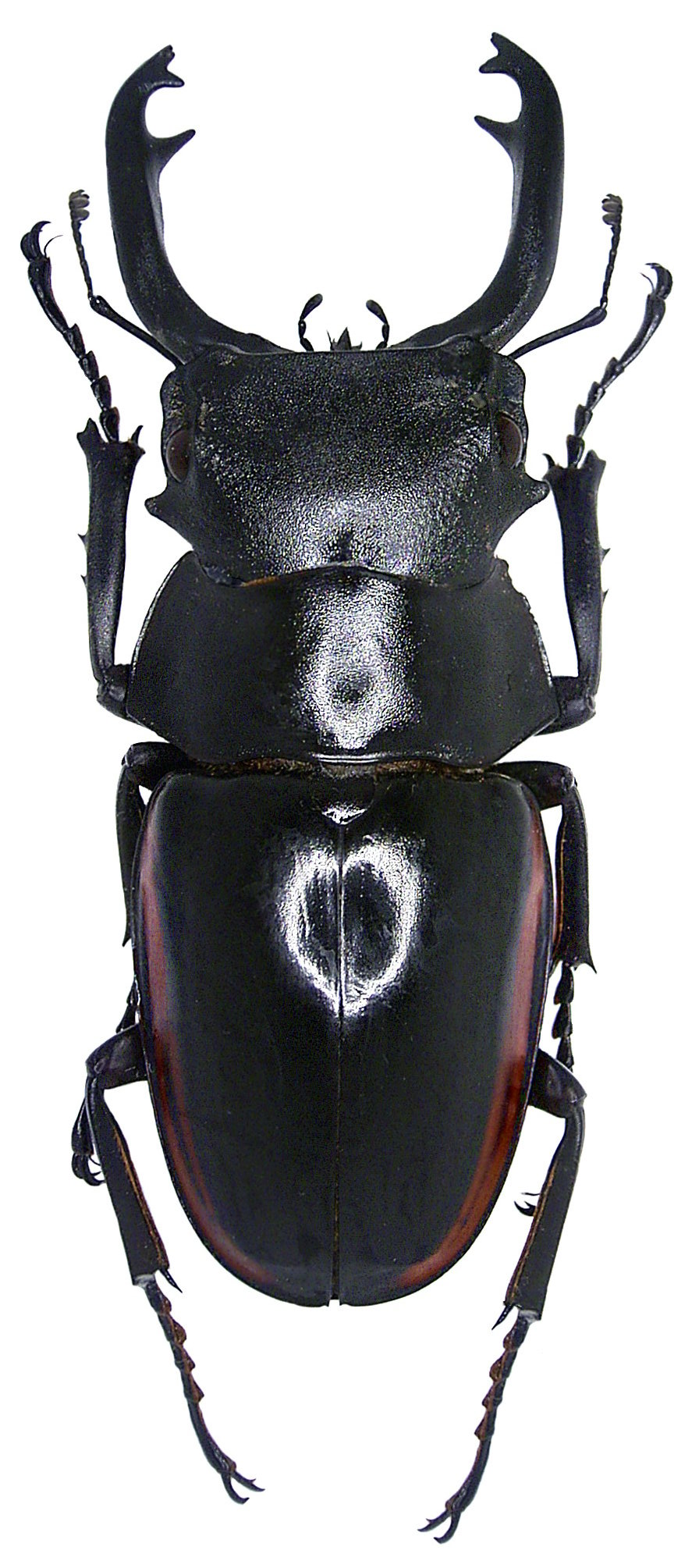 Familie: Lucanidae Groesse: 44-82 mm Fundort: Indonesien, Sulawesi det. A.Skale, 2006 Photo: U.Schmidt, 2006